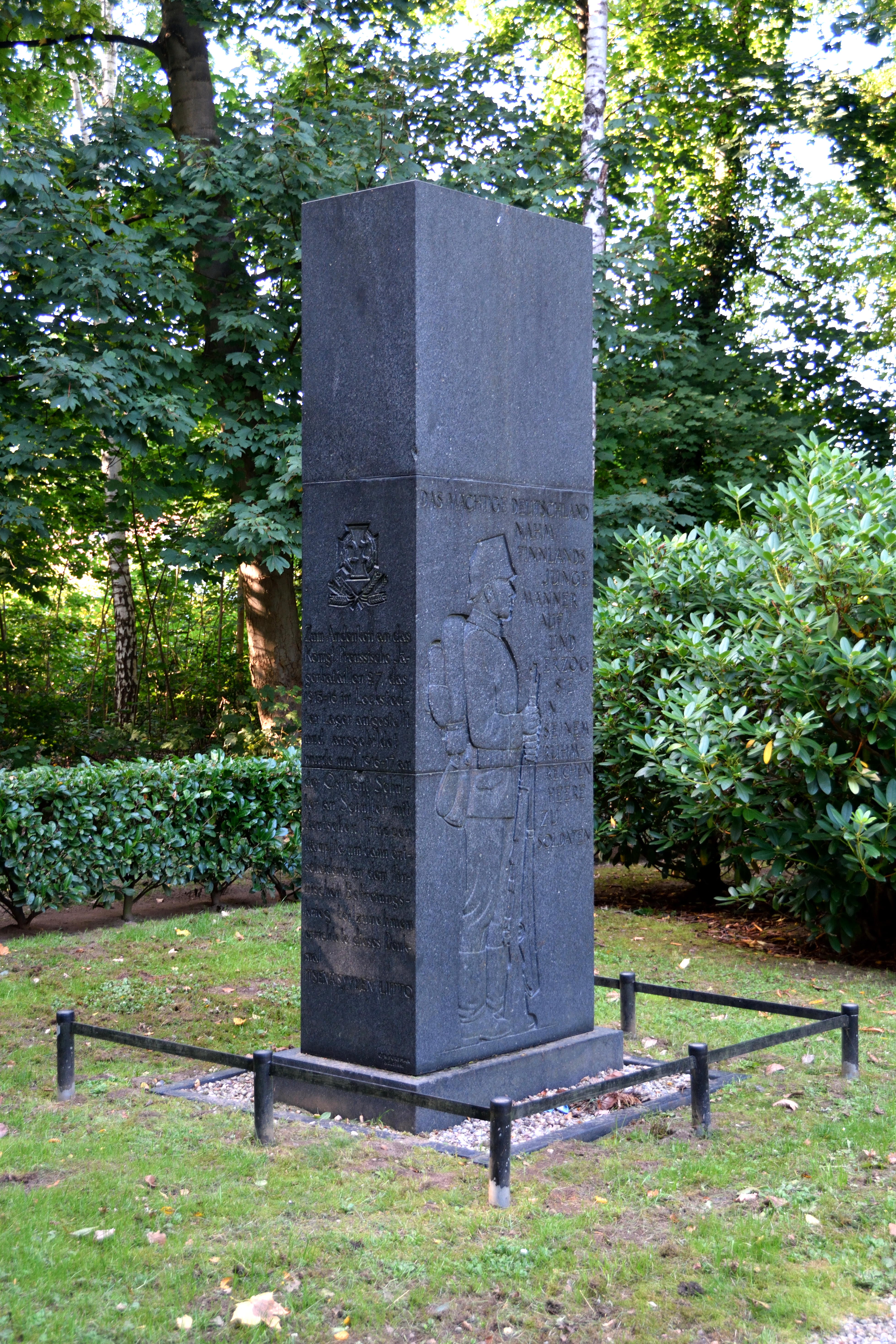 Bilder aus dem Ehrenhain in Hohenlockstedt Vorderseite: DAS MÄCHTIGE DEUTSCHLAND NAHM FINNLANDS JUNGE MÄNNER AUF UND ERZOG SIE IN SEINEM RUHM– REICHEN HEERE ZU SOLDATEN Rückseite: ZUR BEFREIUNG DES VATER– LANDES ERHOB SICH FINNLANDS JUGEND ZU BEGINN DES WELTKRIE– GES UND GING IN DIE FREMDE UM DORT DAS WAFFEN– HAND– WERK ZU ERLER– NEN Linke Seite: Zum Andenken an das Königl. Preussische Jä– gerbataillon 27, das 1915–16 im Locksted– ter Lager aufgestellt und ausgebildet wurde und 1916–17 an der Ostfront Schul- ter an Schulter mit deutschen Truppen kämpfte, um dann ent– scheidend an dem fin– inschen Befreiungs– krieg teilzunehmen errichtete diese Denk– mal ITSENÄISYYDEN LIITTO Rechte Seite: Suomalaisen Jääkä– ripataljoonan muis– toksi pystytti tämän patsaan ITSENÄISYYDEN LIITTO[1] Till minne av Finske Jägarbataljonen upp- restes detta monument av ITSENÄISYYDEN LIITTO ↑ Übersetzung